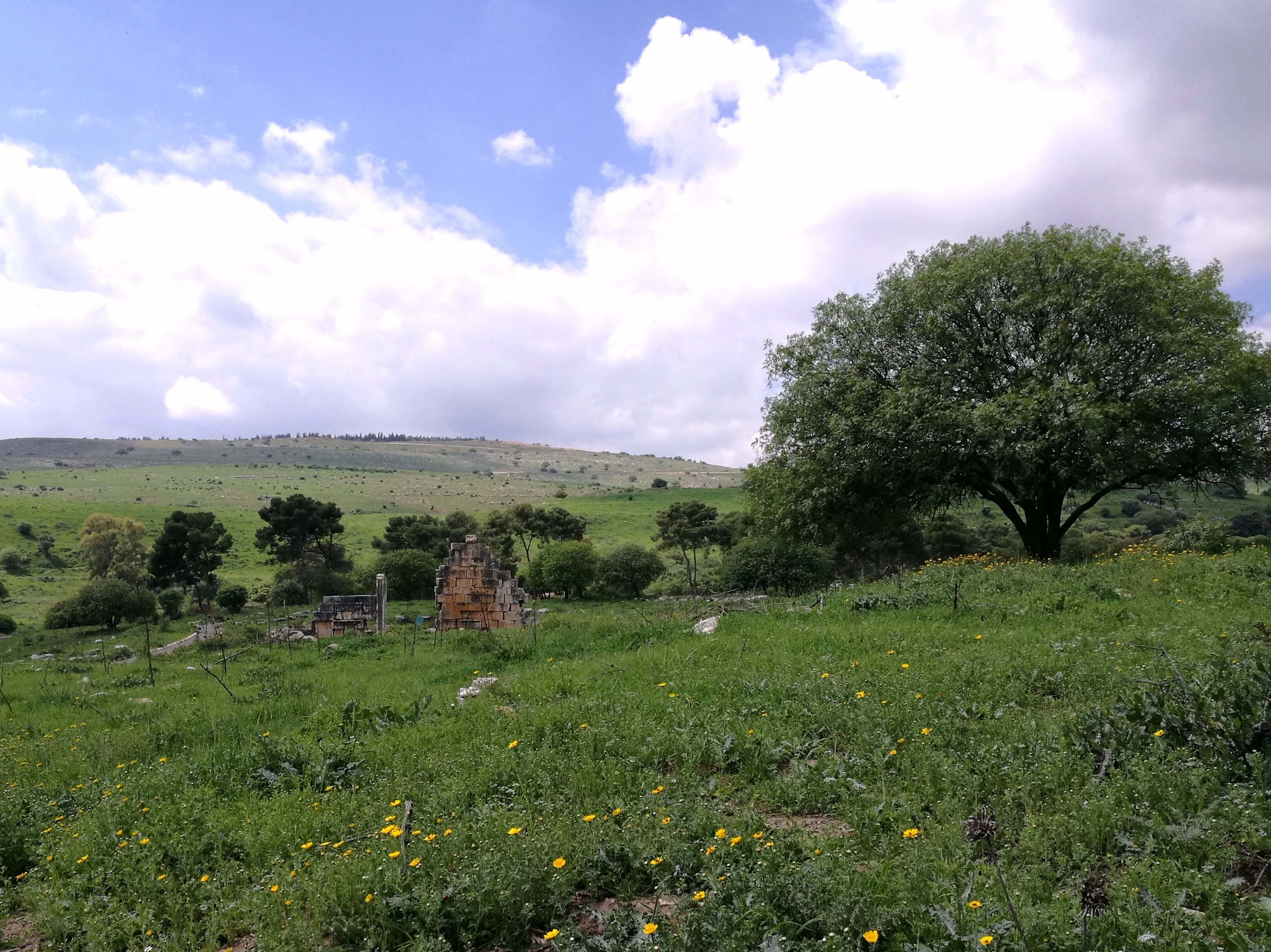 המקדש הרומי בתל קדש, מראה משביל ההליכה הסובב את התל.